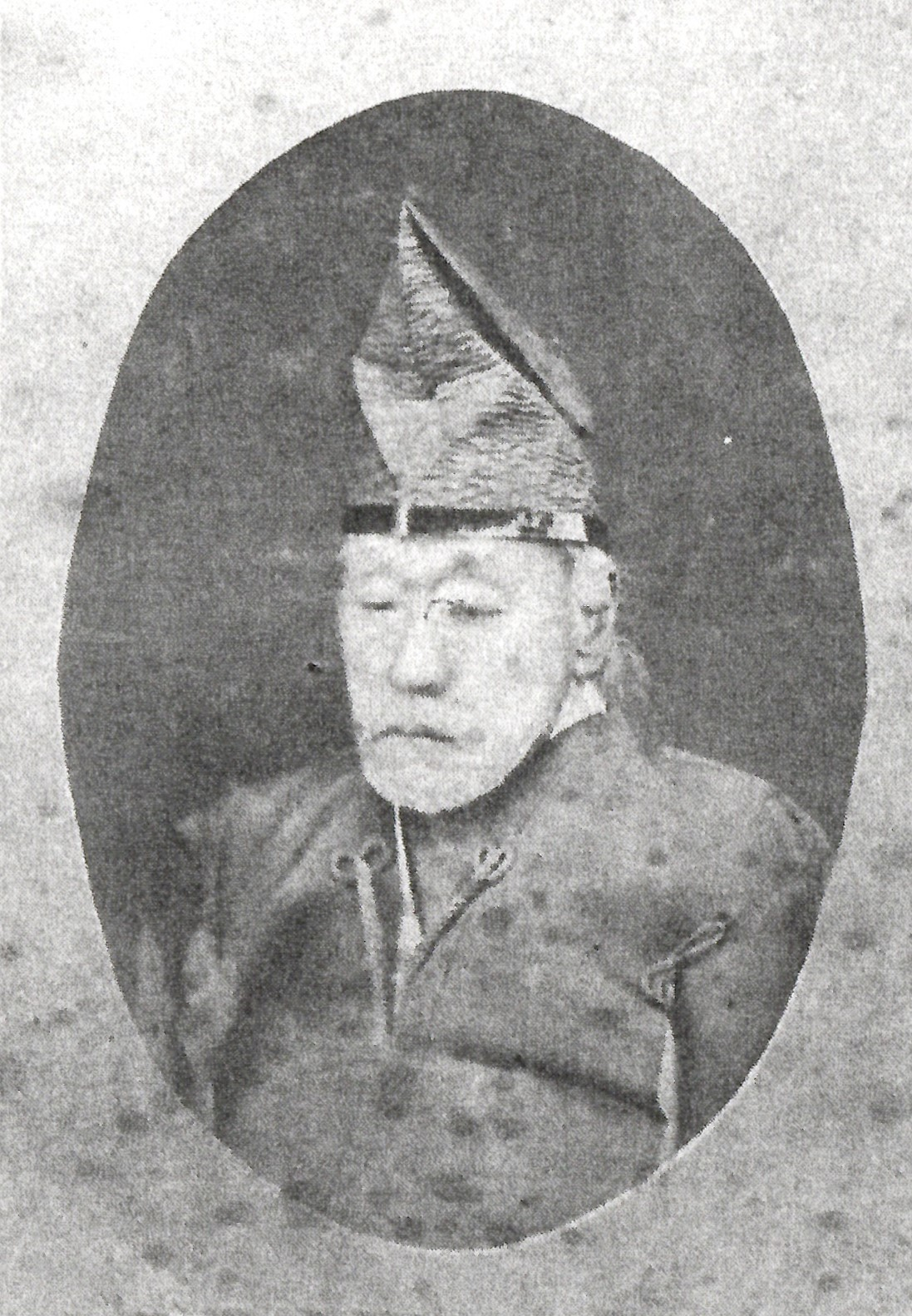 堀親義の肖像写真。